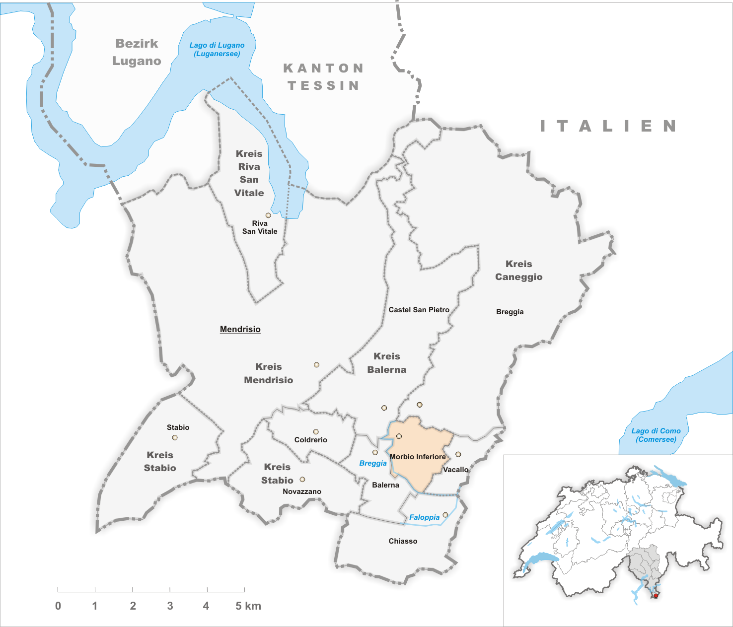 Municipality Morbio Inferiore